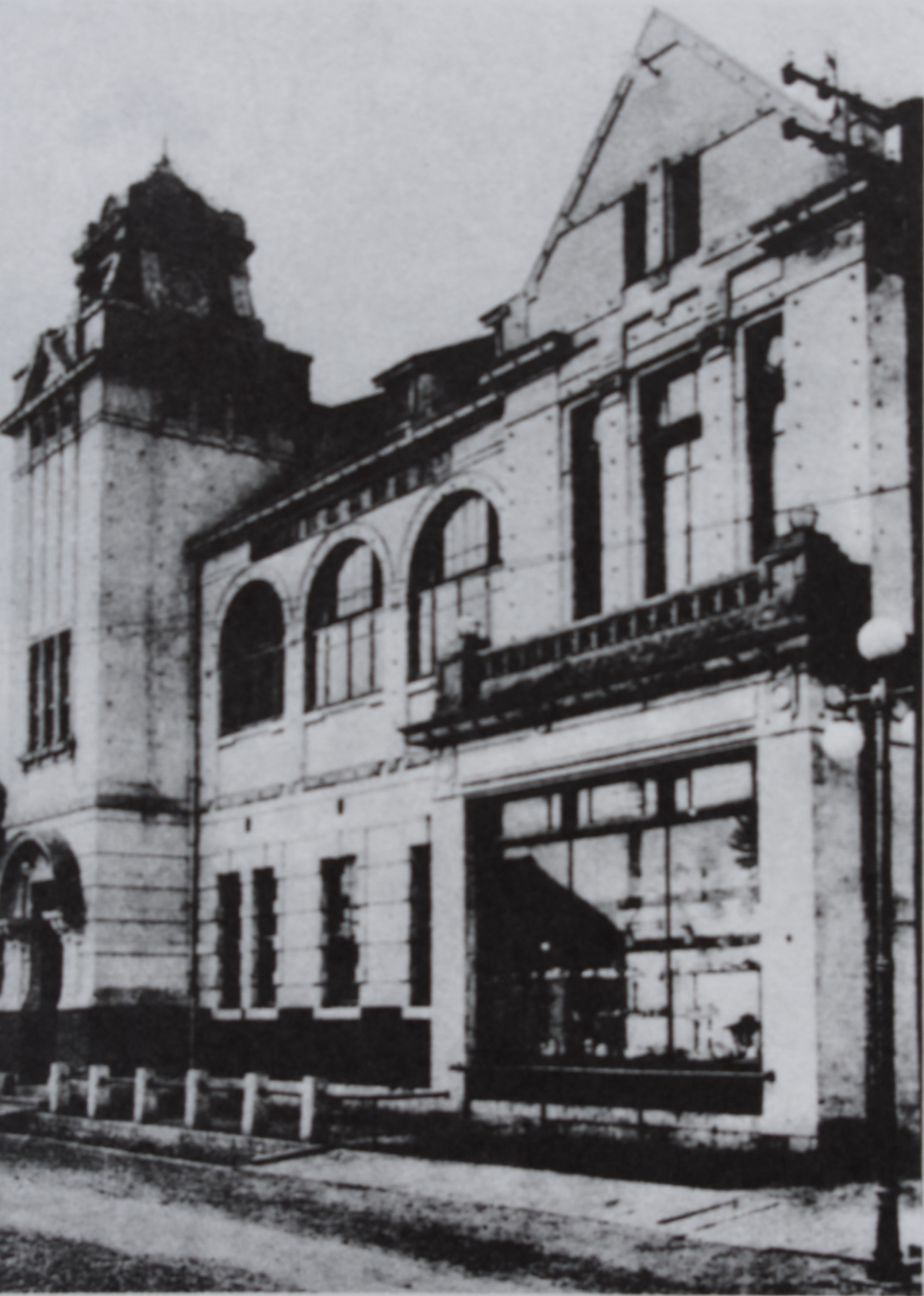 甲府市 甲府電力